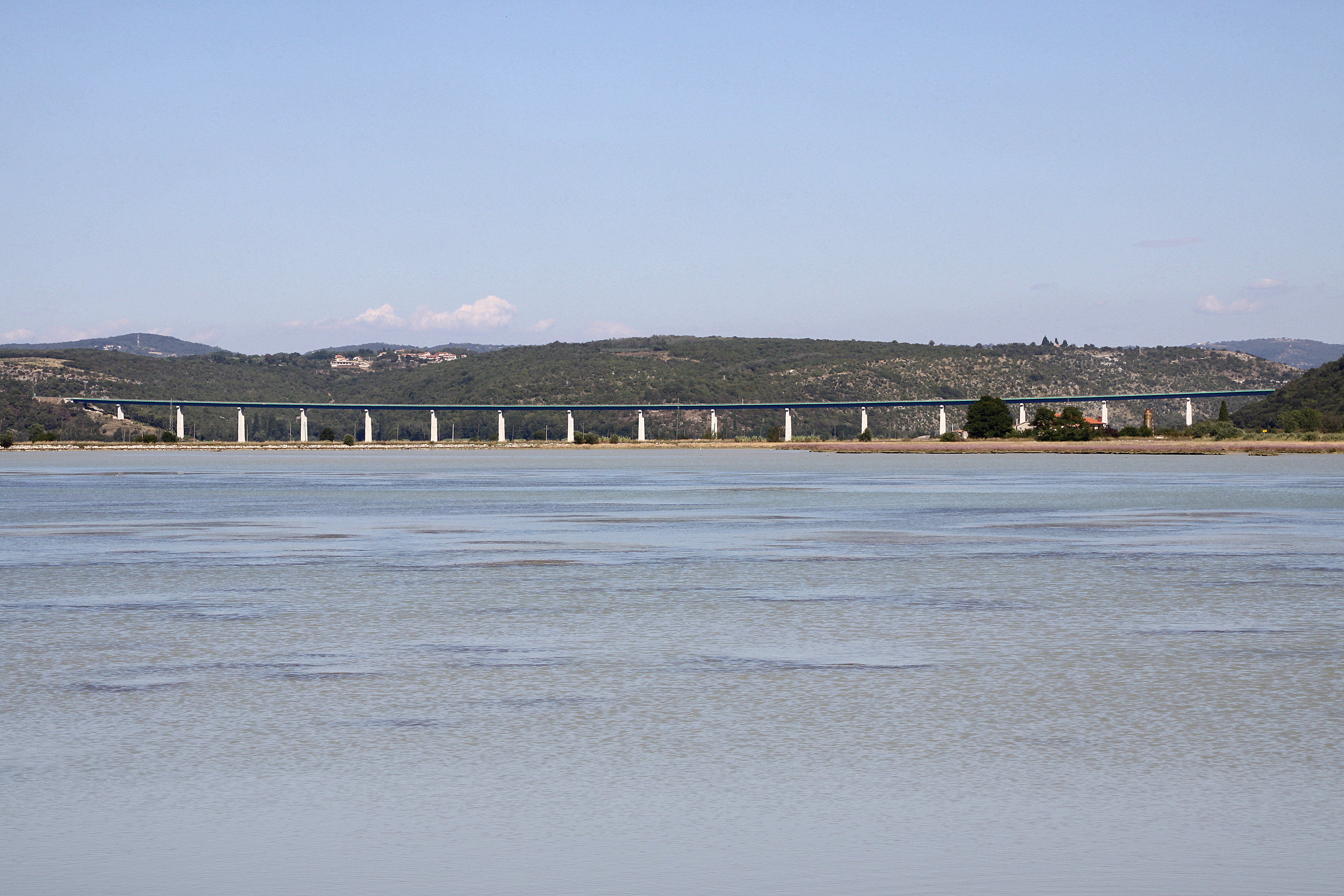 Autobunnsbréck iwwer d'Mirna